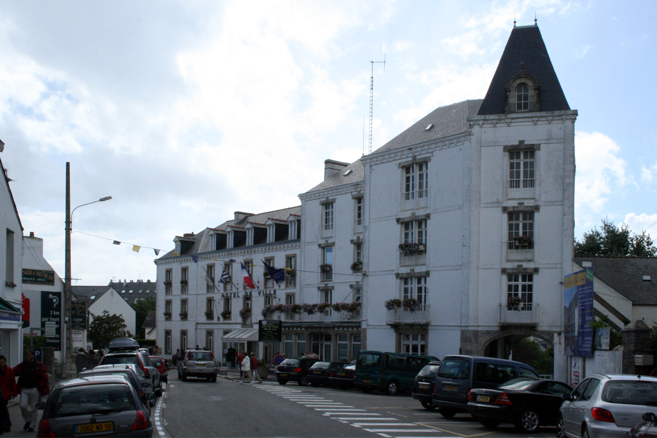 Mairie de Quiberon